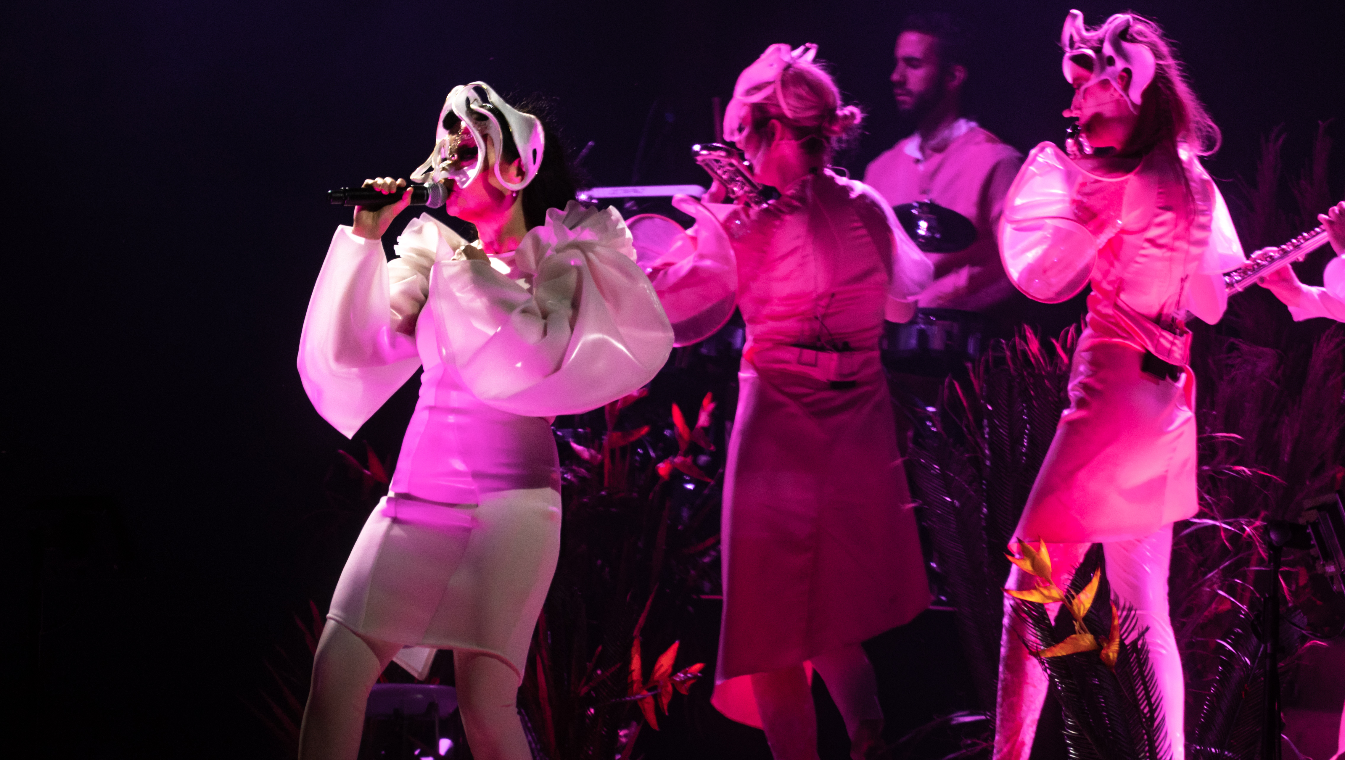 APEVicPark270518-123